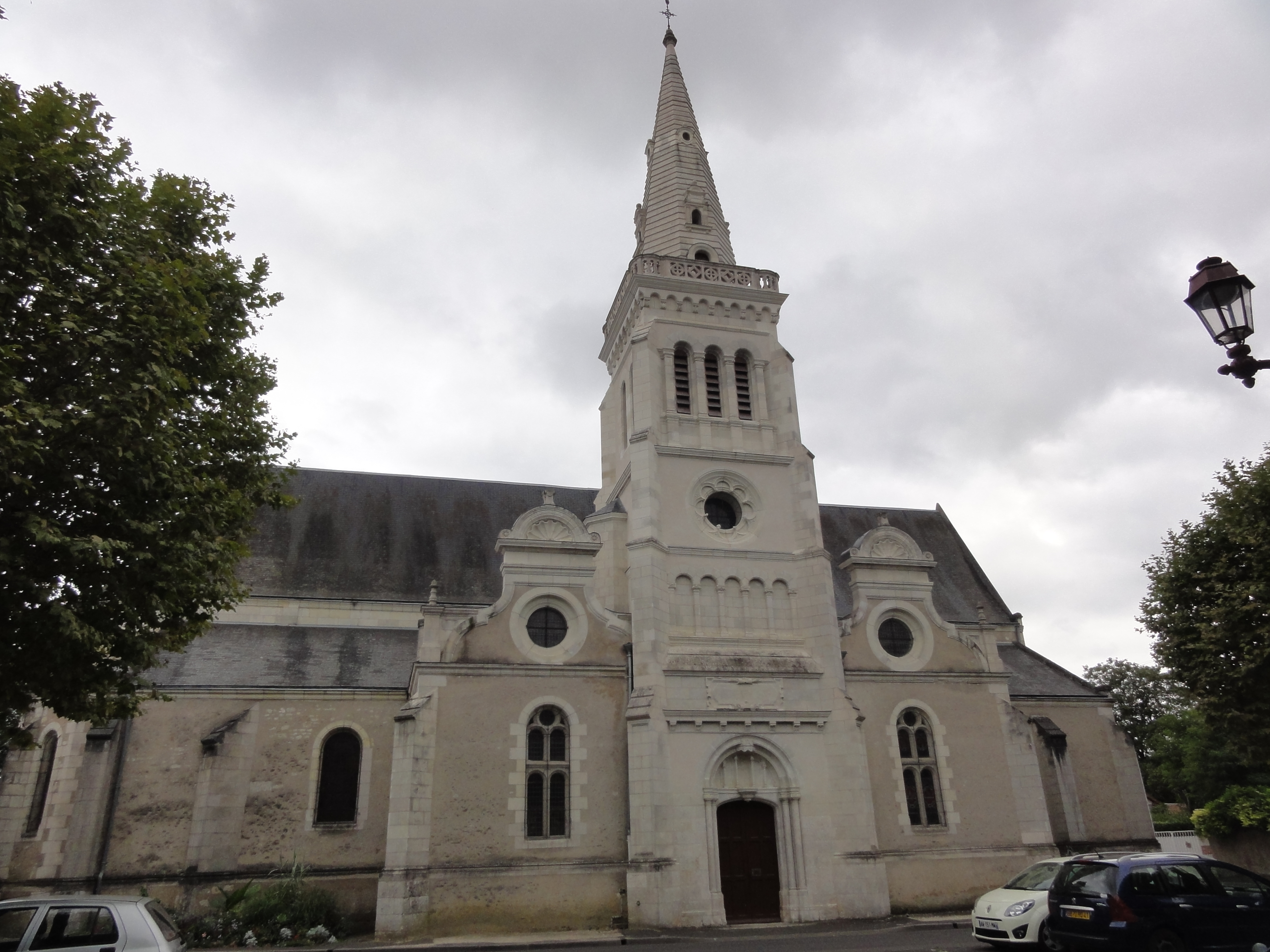 Église Saint-Cyr-et-Sainte-Julitte de Contres